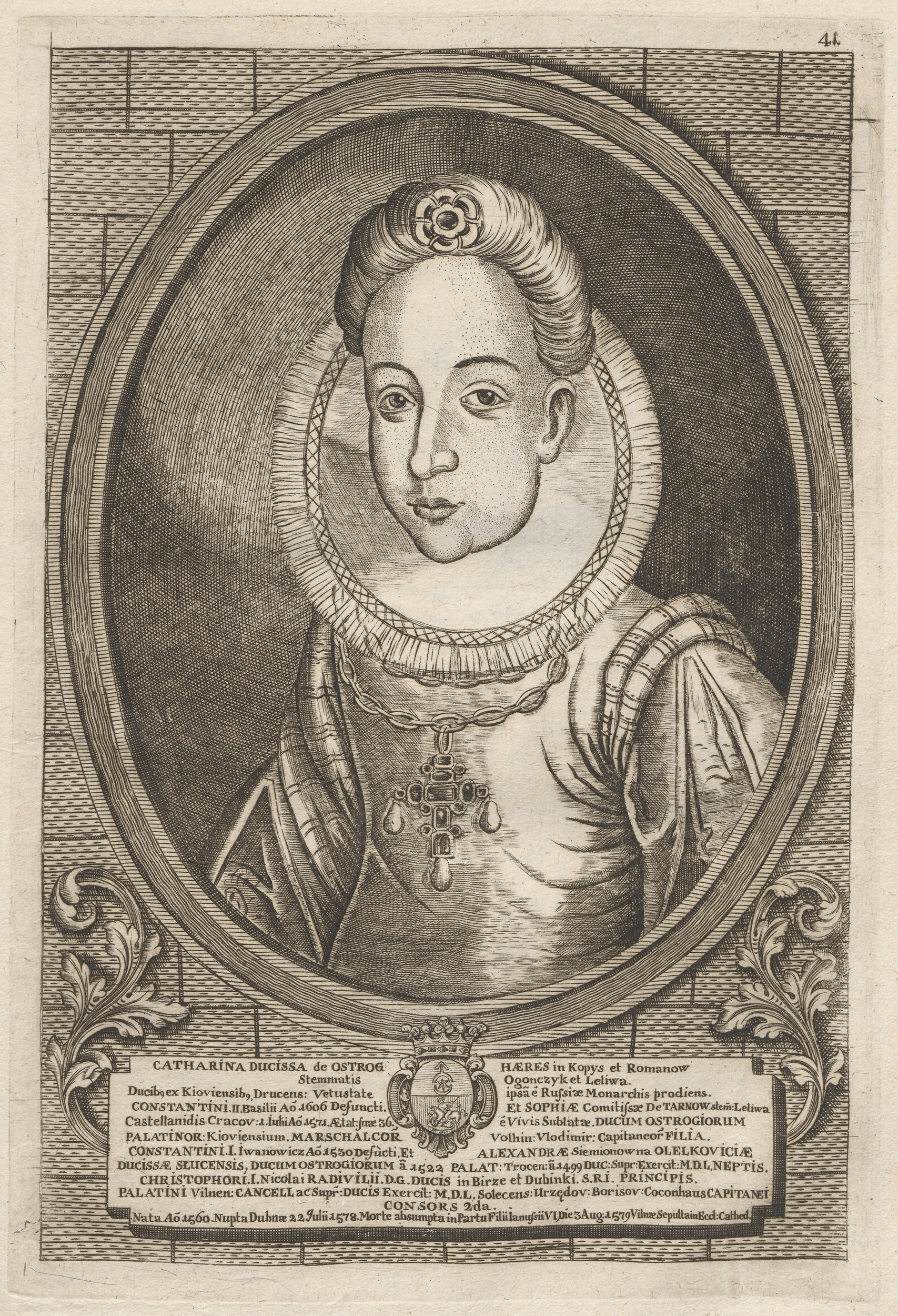 Беларуская (тарашкевіца): Партрэт Кацярыны Радзівіл (Kaciaryna Radzivił) з князёў Астроскіх (Astroski)